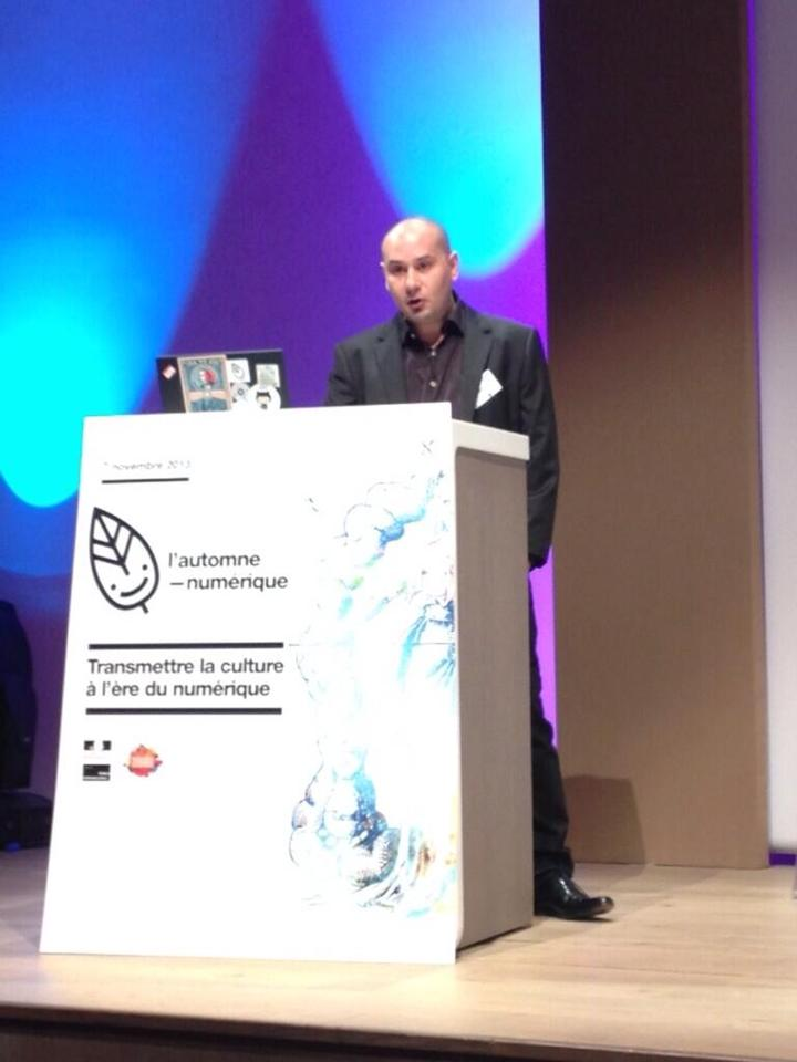 "Les net-artistes en réseau et les nouvelles initiatives d’exposition en ligne"